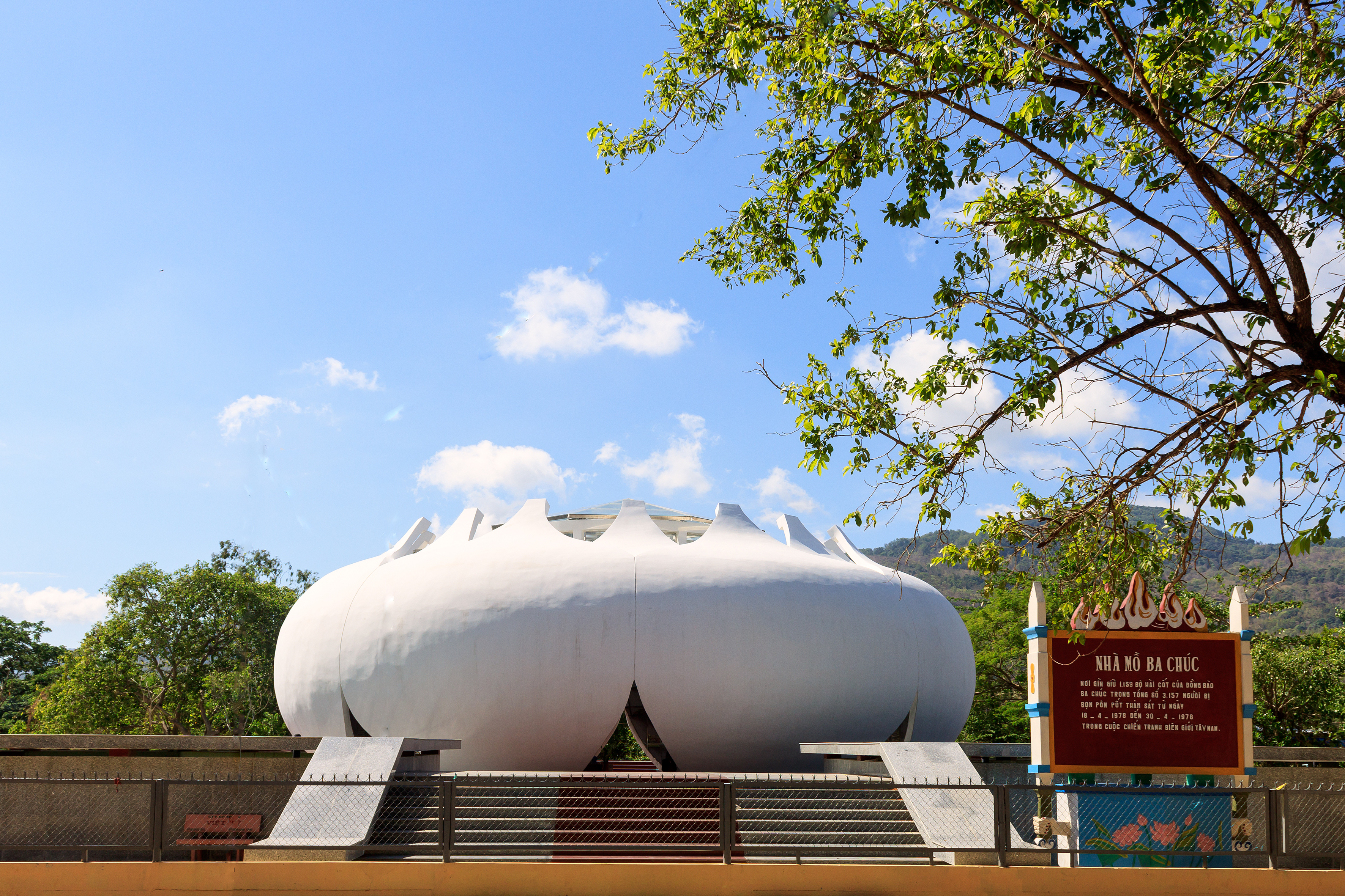 Nhà mồ Ba Chúc ở thị trấn Ba Chúc, Tri Tôn, An Giang..